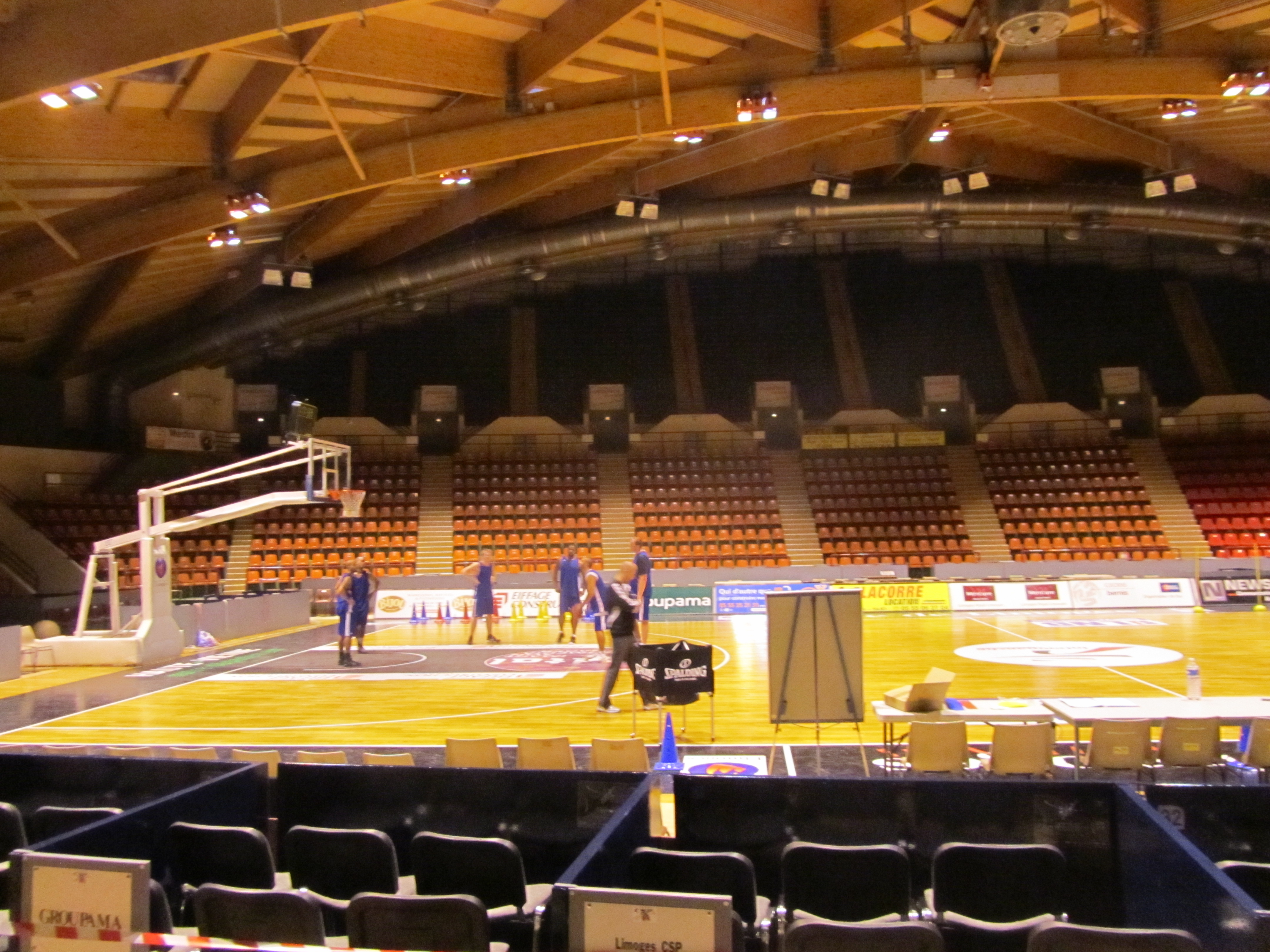 La voute en bois de Beaublanc et ses tribunes au club français de basket-ball Limoges CSP.